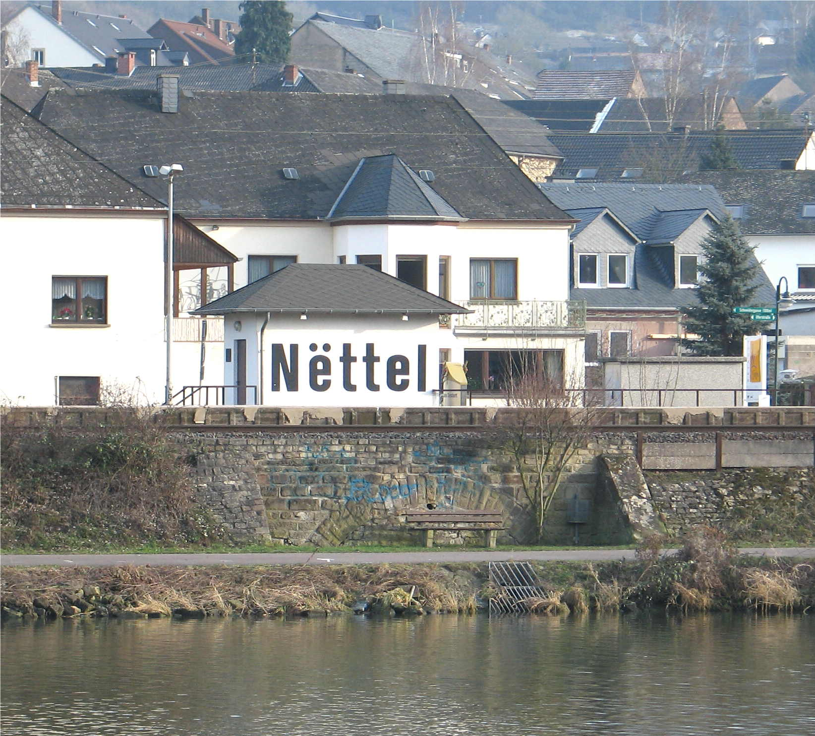 Nëttel